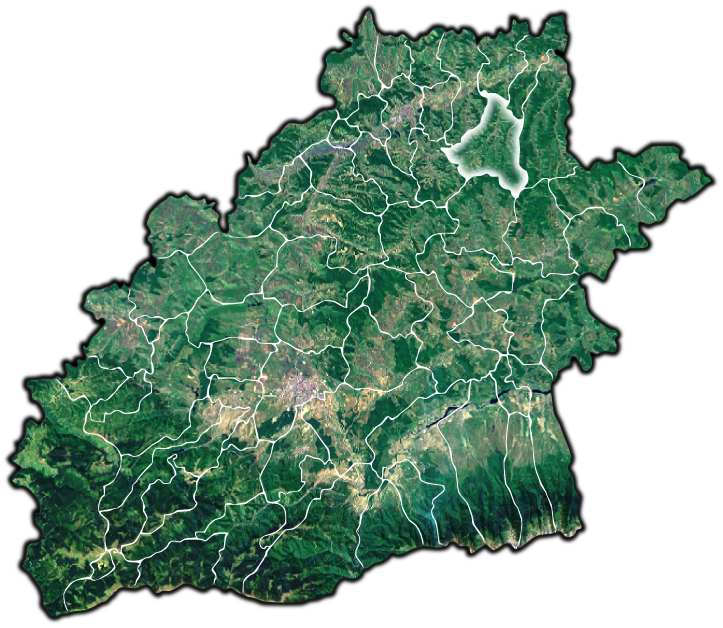 Biertan jud Sibiu.